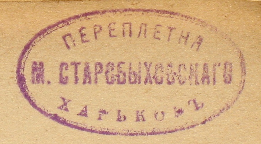 Переплётня М. Старобыховскаго, Харьков. Переплёт собрания сочинений Чехова в 16 томах. 1903 год.